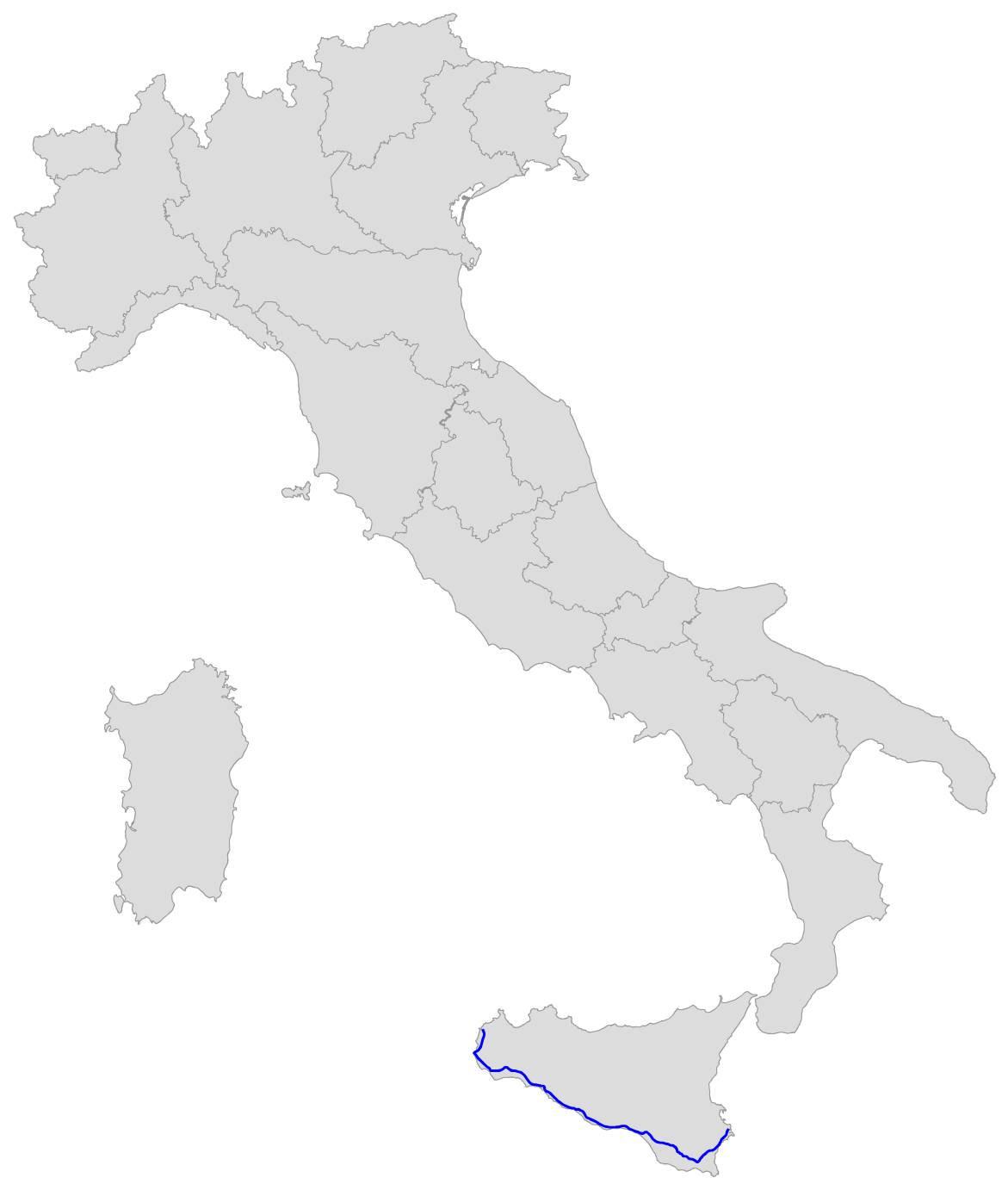 Percorso della SS 115 Sud Occidentale Sicula